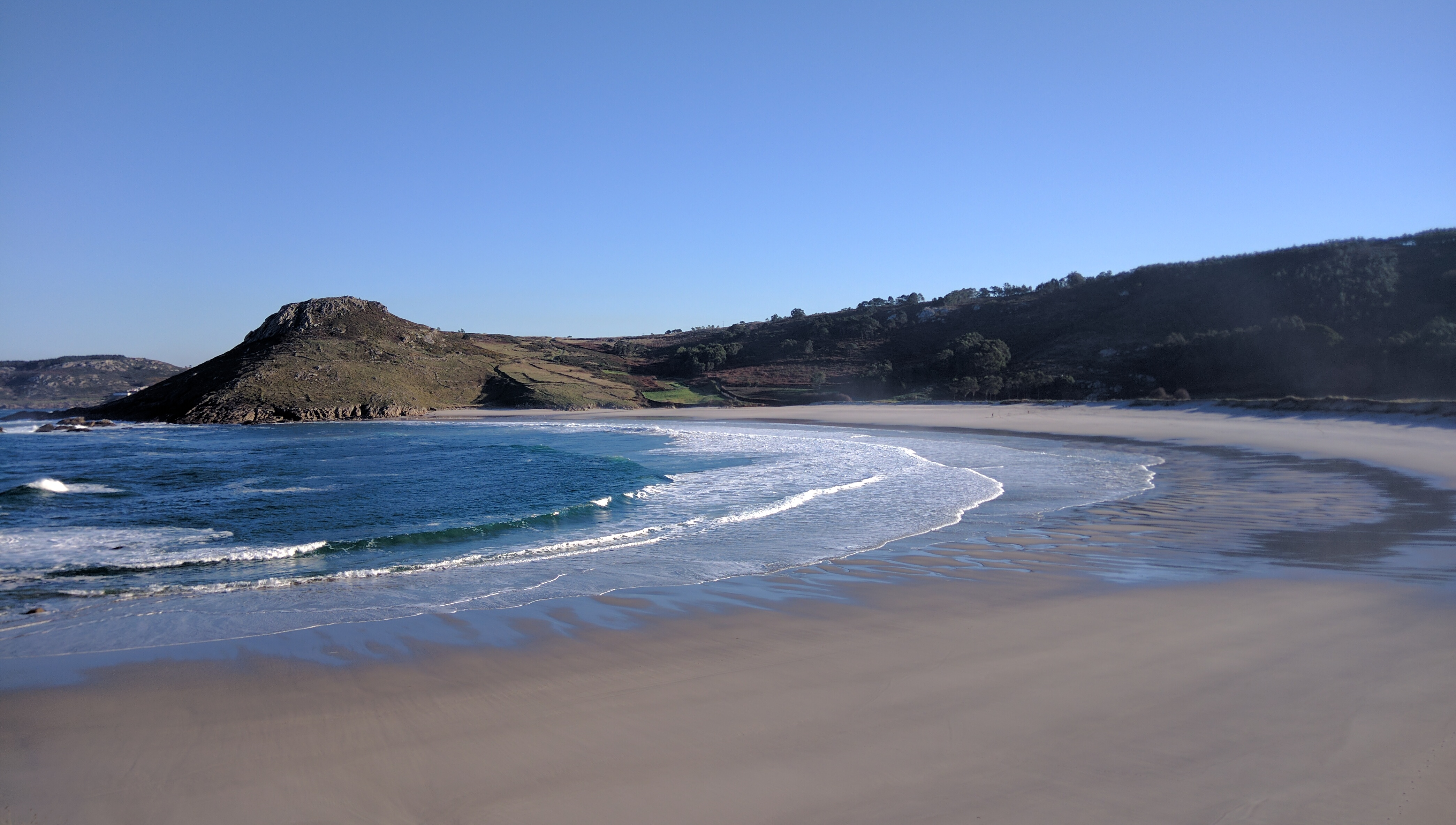 Costa da Morte - Playa de Soesto (Laxe, A Coruña) This is a photography of a Special Area of Conservation in Spain with the ID: ES1110005. Natura2000 entry, EEA entry